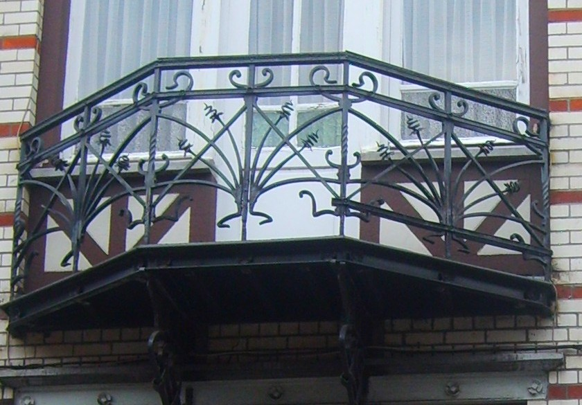 vennes, de l'architecte liégeois Henri Thullier